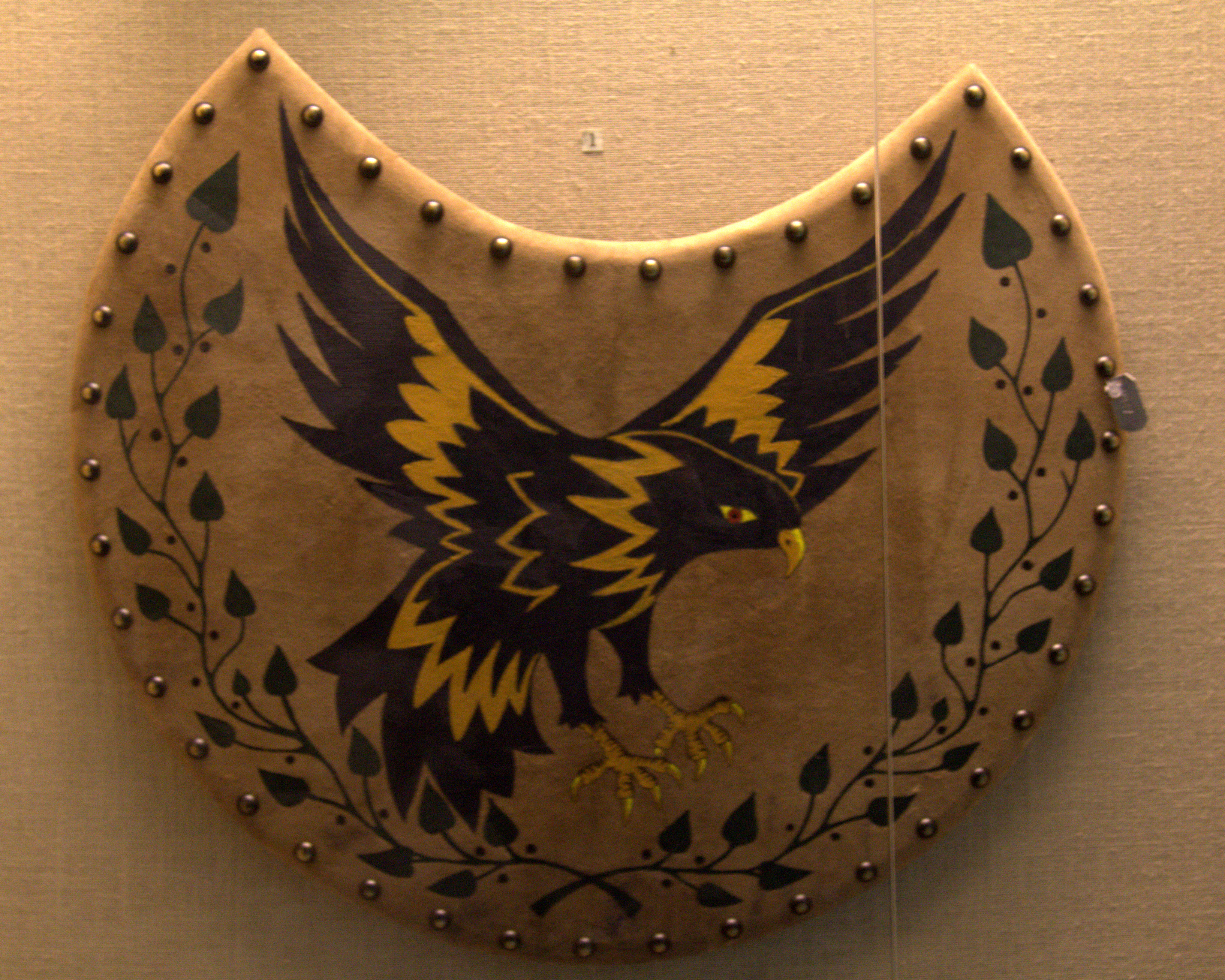 Hellenic War Museum (Athens, Greece). --- Περσική ασπίδα κλασσικής εποχής. Πολεμικό Μουσείο Ελλάδος. Αθήνα.